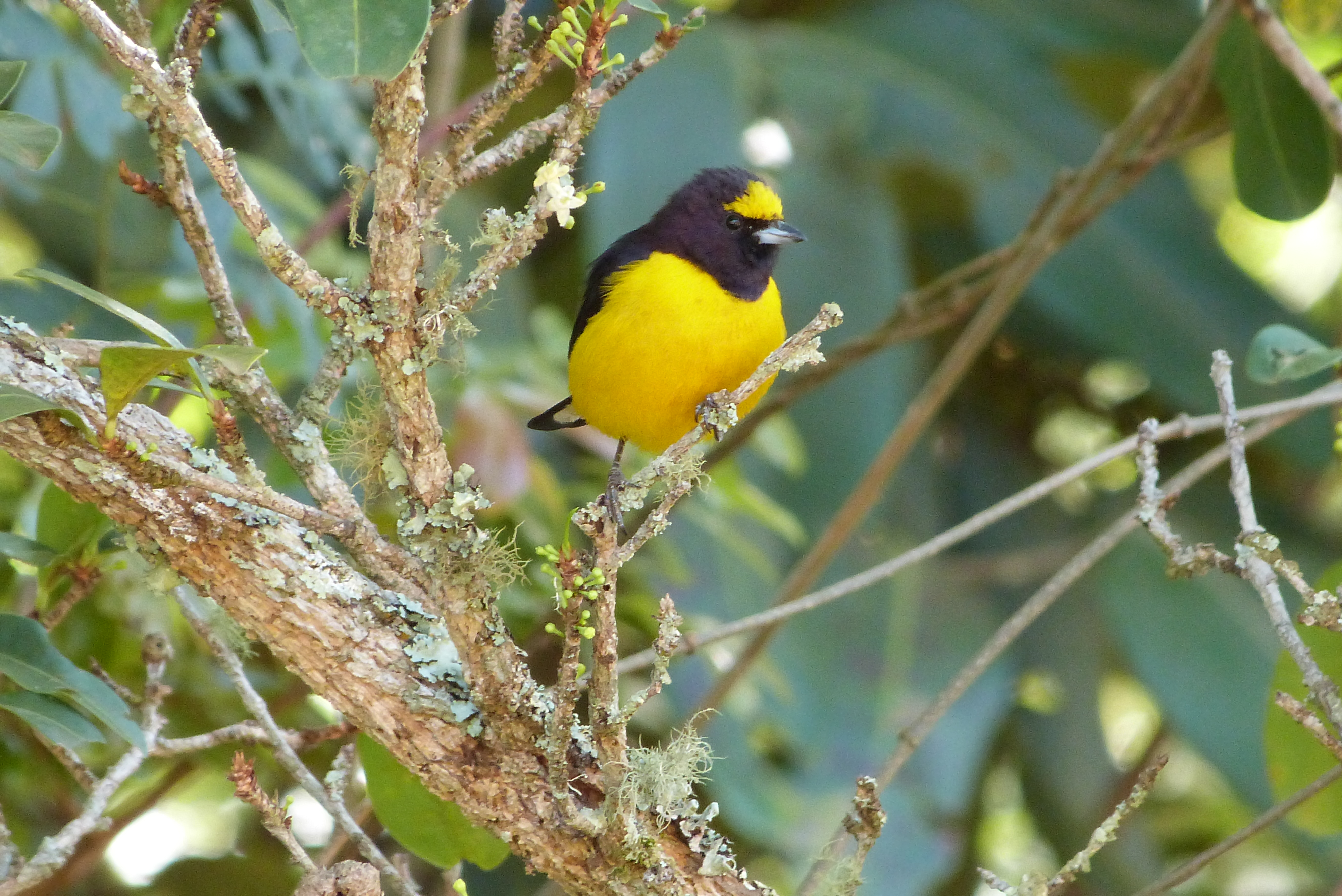 Foto tirada em Entre Rios - MG